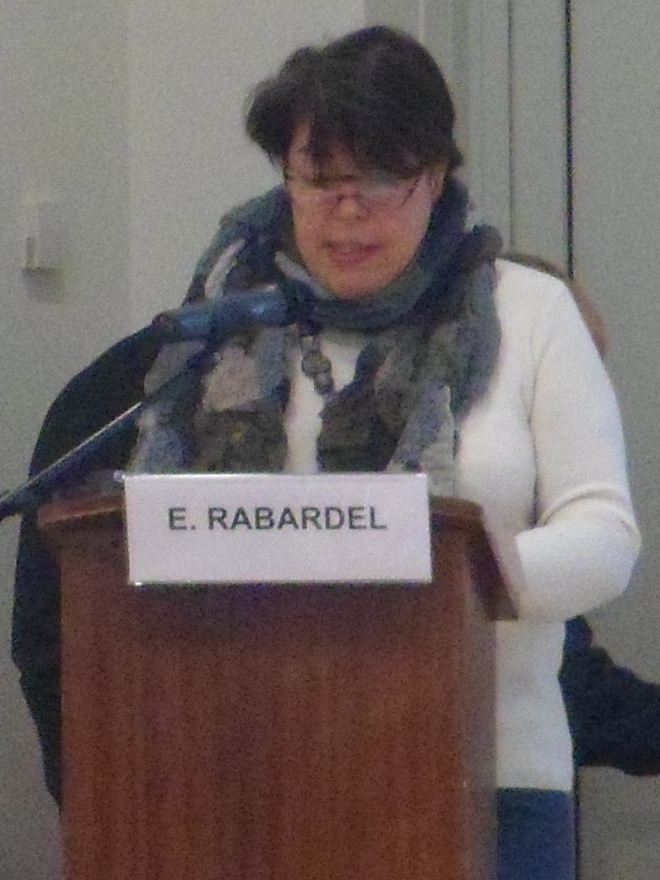 Evelyne Rabardel, conseillère générale du Val-de-Marne pour Vitry-sur-Seine Est, 3e vice-présidente du Conseil général (culture, archéologie, archives et observatoire de l’égalité), introduisant une conférence aux Archives départementales du Val-de-Marne.